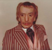 Immagine precedente il 1988